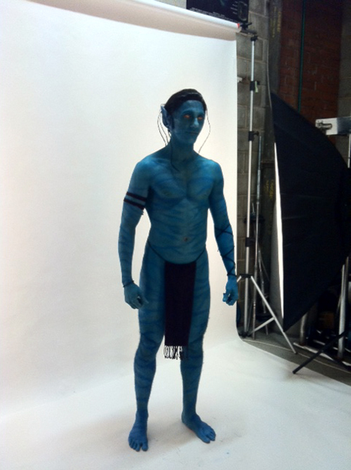 Avatar bodypainting